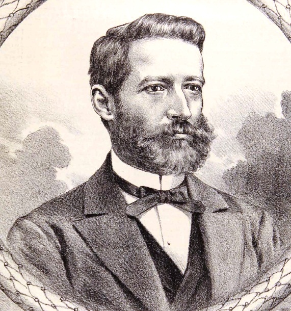 José Santos Ossa (Huasco, 1 de noviembre de 1827- Isla San Félix, 1878), fue un minero, explorador y empresario chileno. Exitoso empresario de la explotación de salitre.